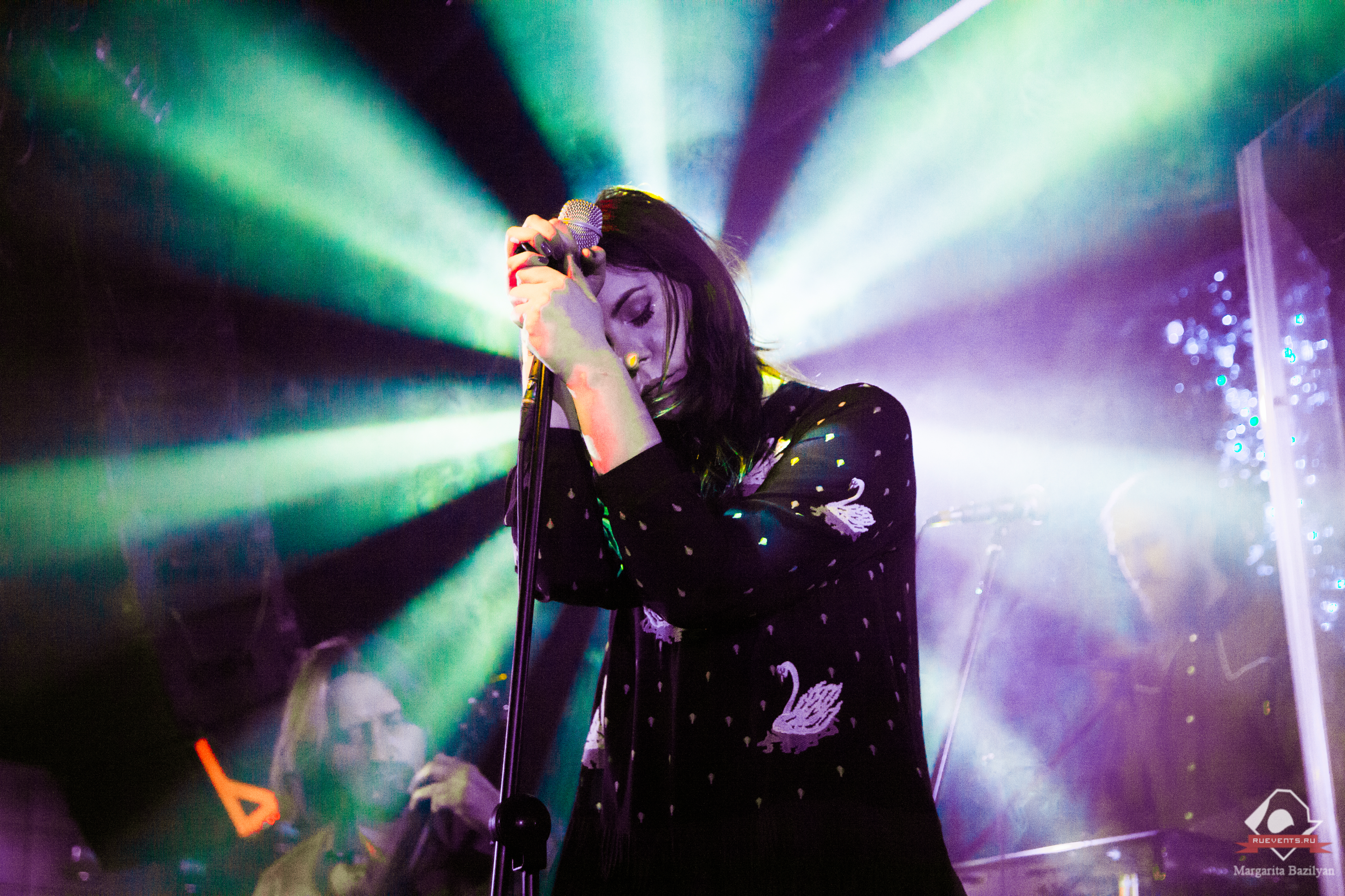 Яна Вева на концерте 22 декабря 2016, 16 тонн, Москва